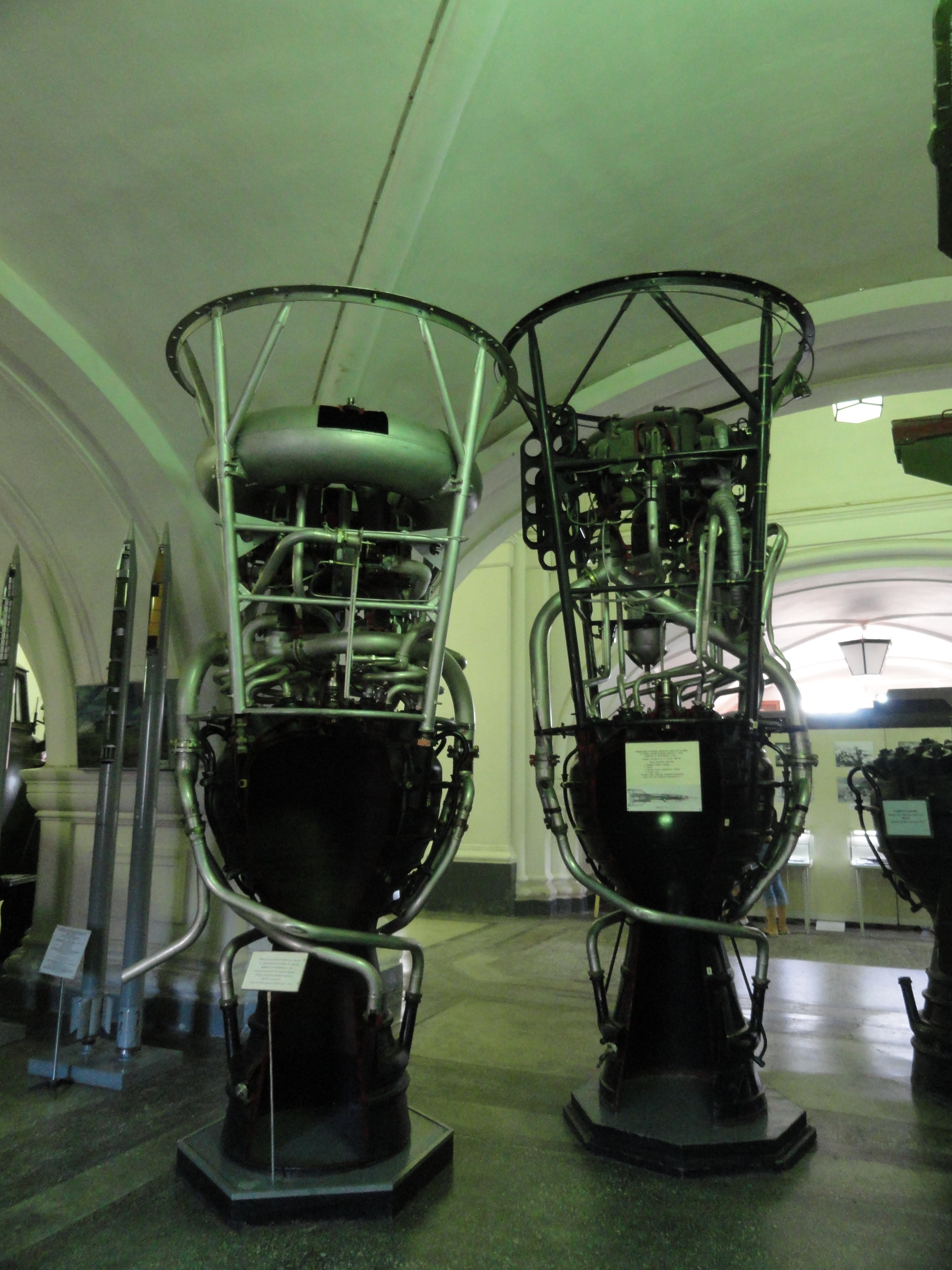 st_petersburg_2018_artillery_museum_26